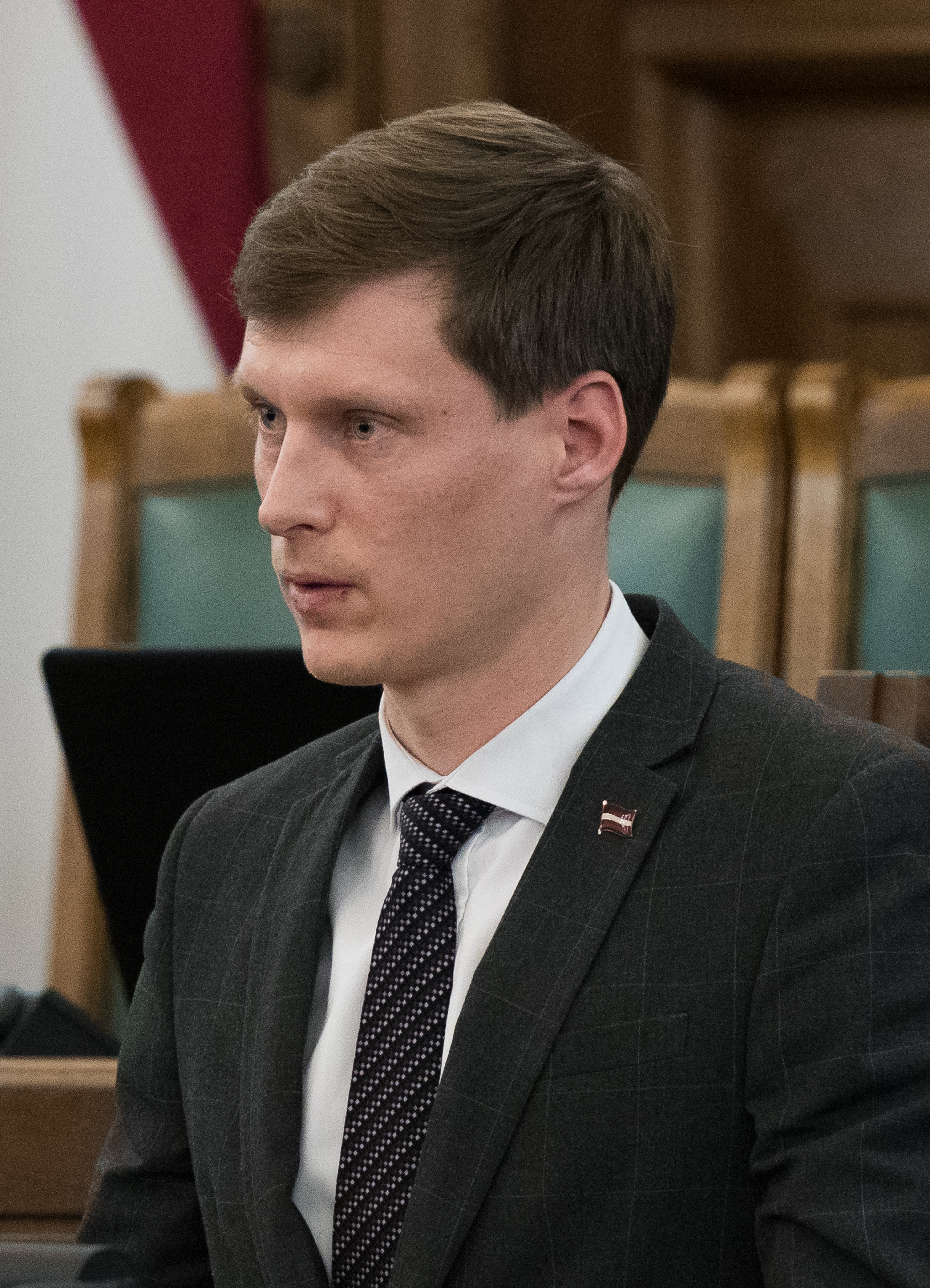 2018.gada 6.novembris. Deputāts Ralfs Nemiro dod svinīgo solījumu. Foto: Ieva Ābele, Saeima Izmantošanas noteikumi: saeima.lv/lv/autortiesibas